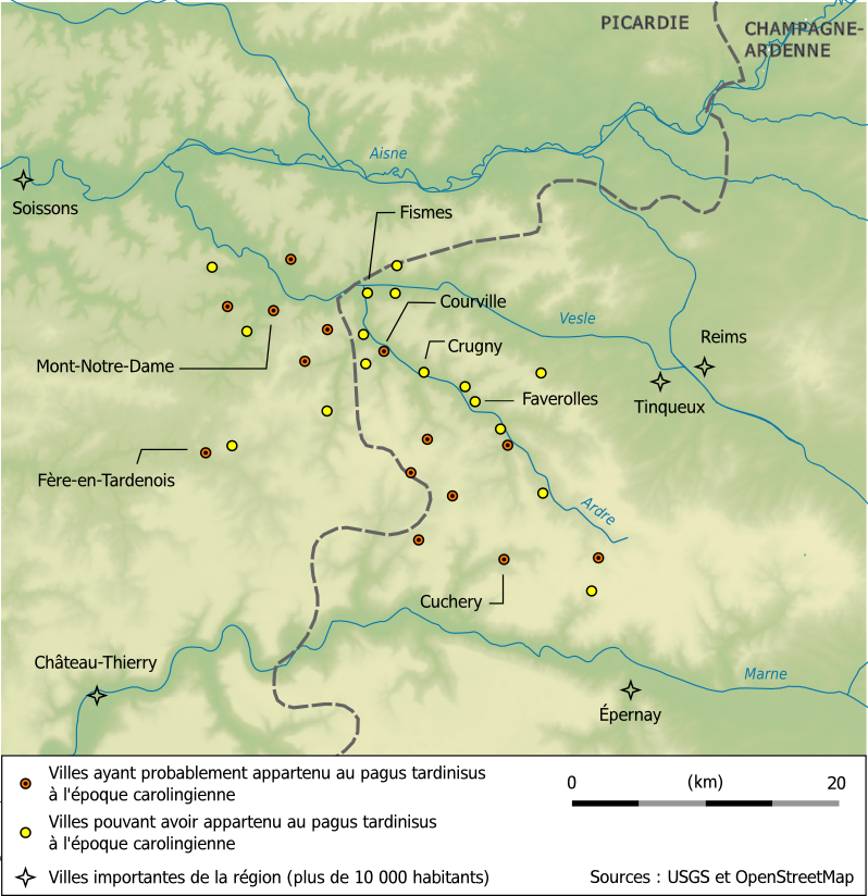 Position des principales villes du « pagus tardinisus » figurant dans les textes de l'époque carolingienne